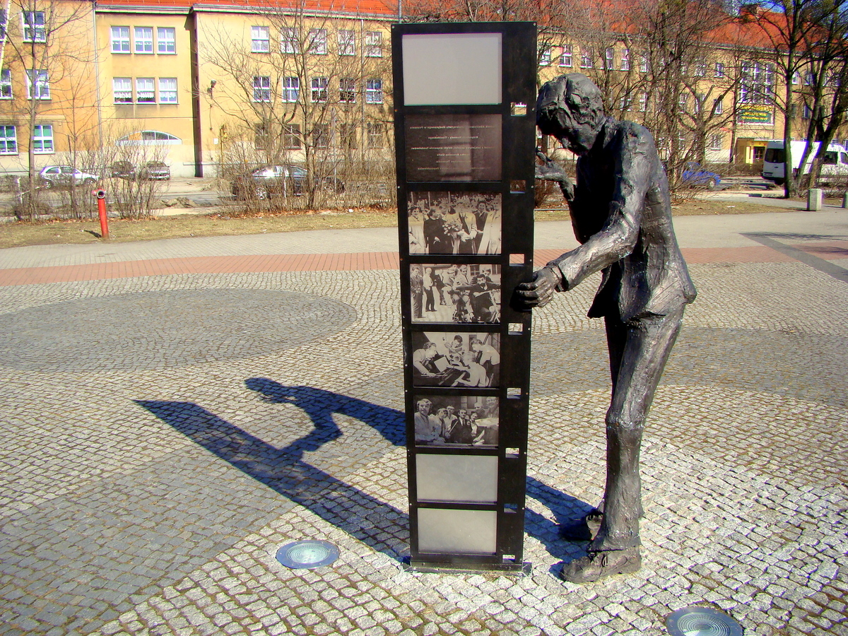 Pomnik u zbiegu ulic Bukowskiej i Przybyszewskiego w Poznaniu (po zmianie lokalizacji, przed biblioteką przy ul. Przybyszewskiego)